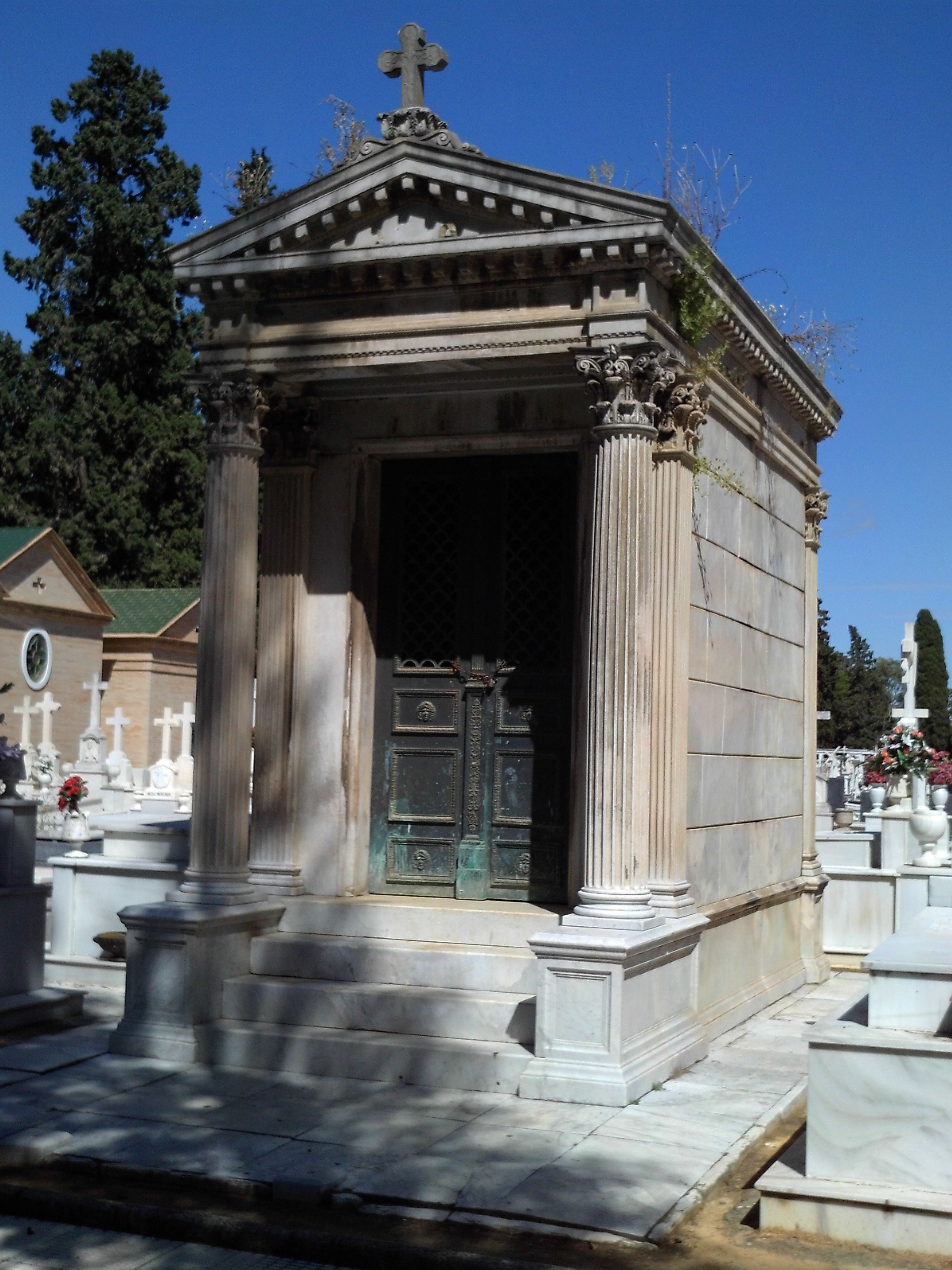 Panteón de la familia Olave. Fue diseñado en 1886 por Joaquín Fernández Ayarragay. Cementerio de San Fernando, Sevilla.